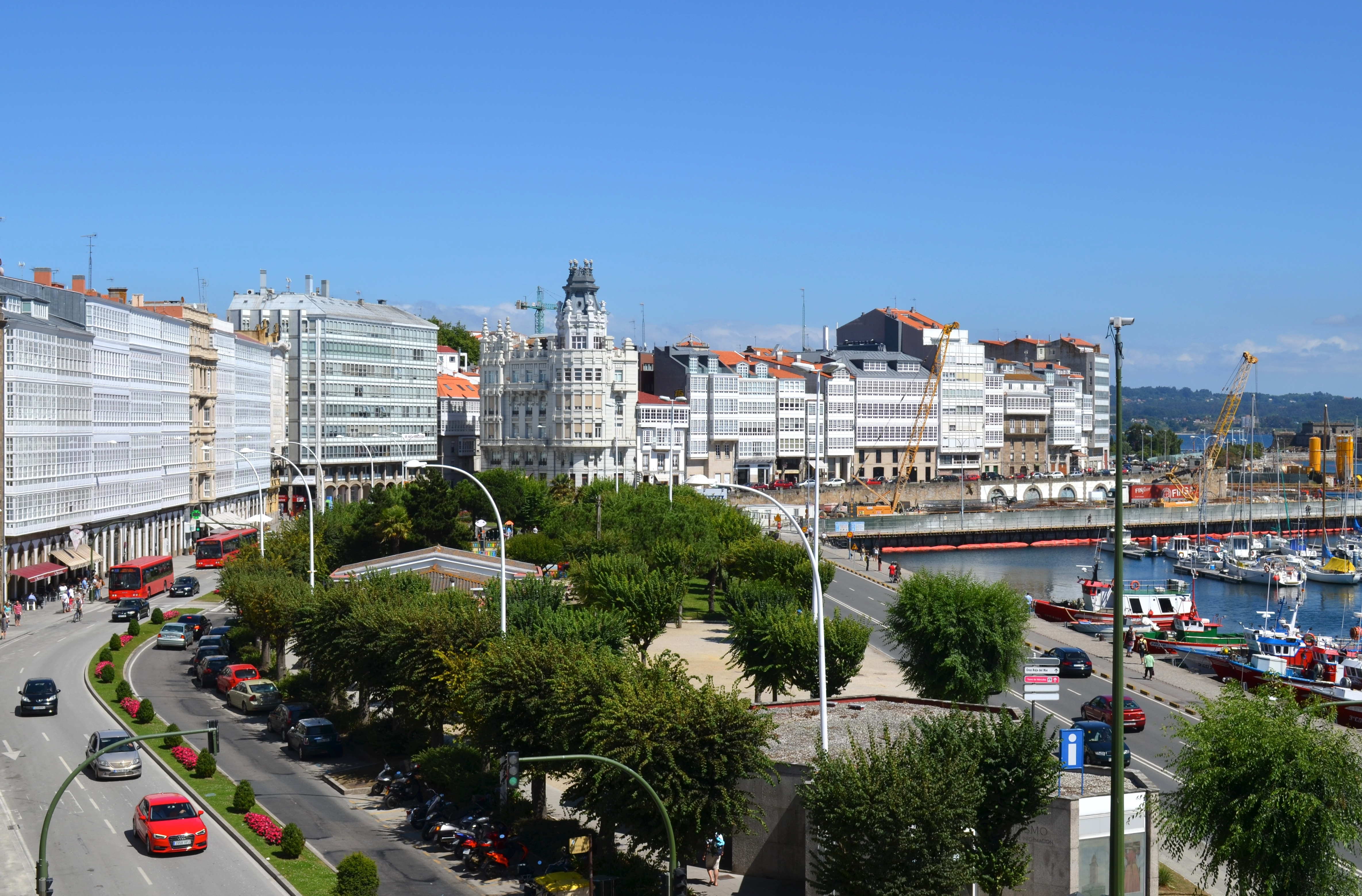 Vista de la avenida de la Marina desde la parte de atrás de la Biblioteca Provincial de la Diputación de A Coruña